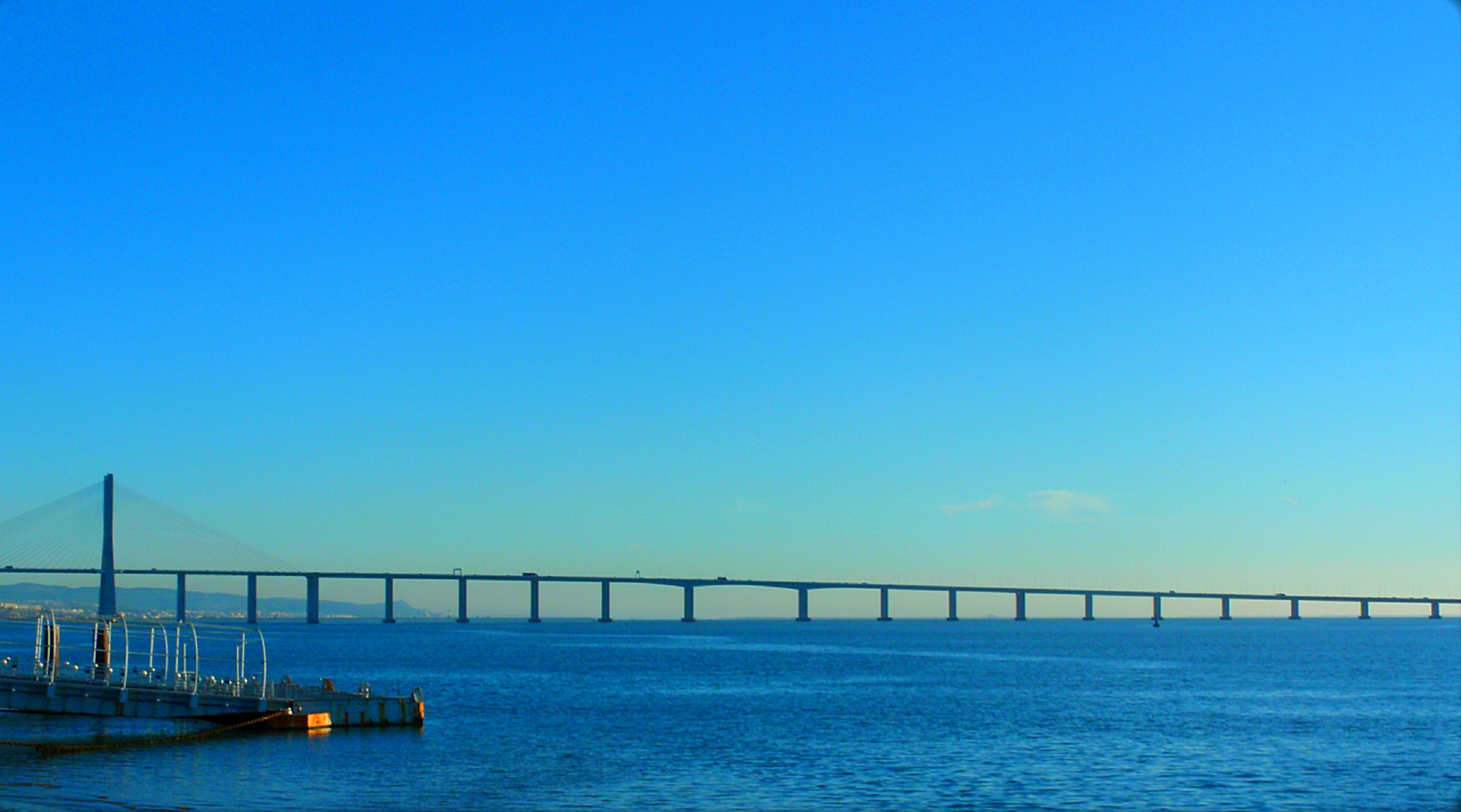 Lisboa (Portugal)